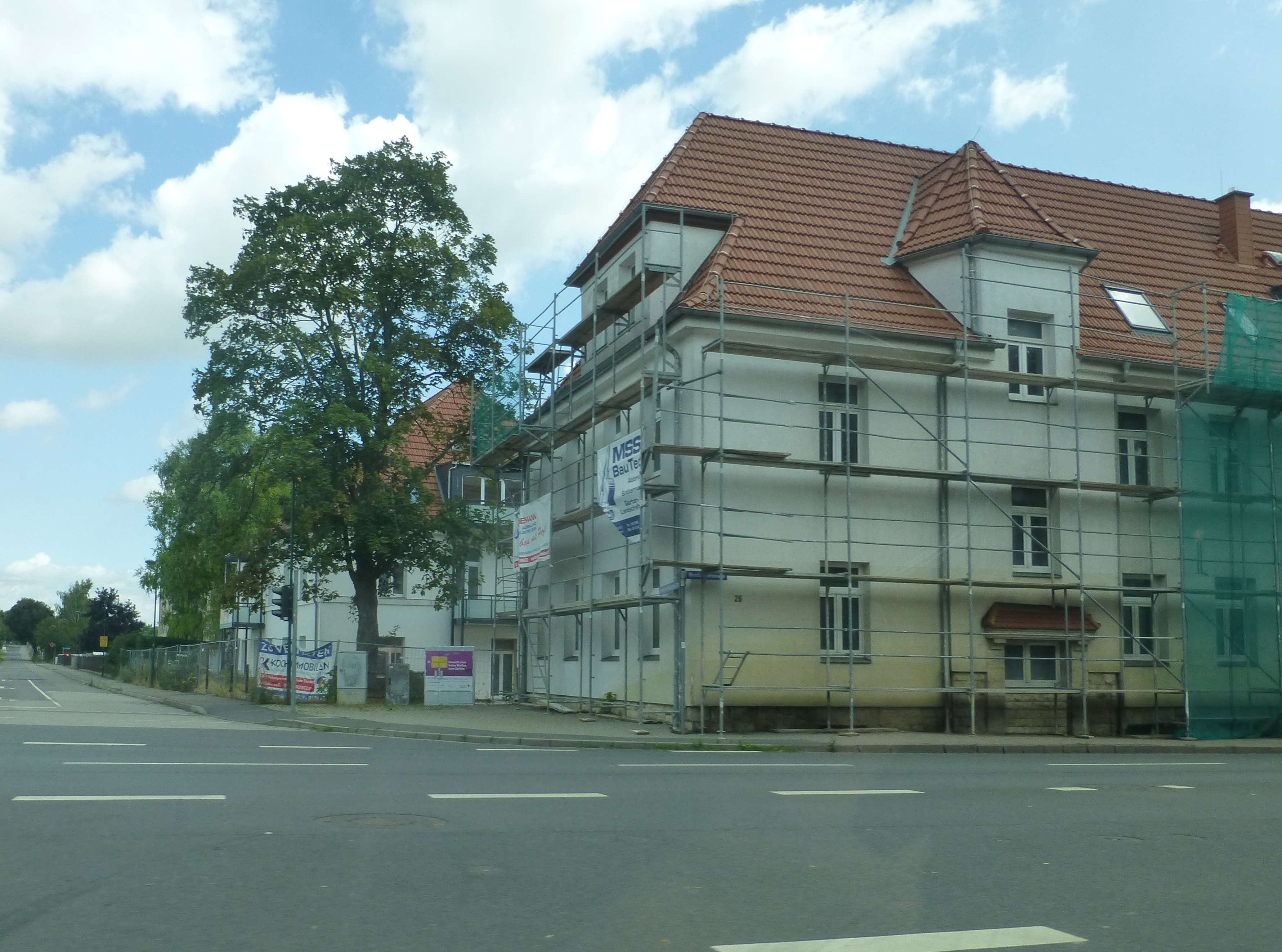 Ehemalige Kasernen in der Wendewehrstraße in Mühlhausen